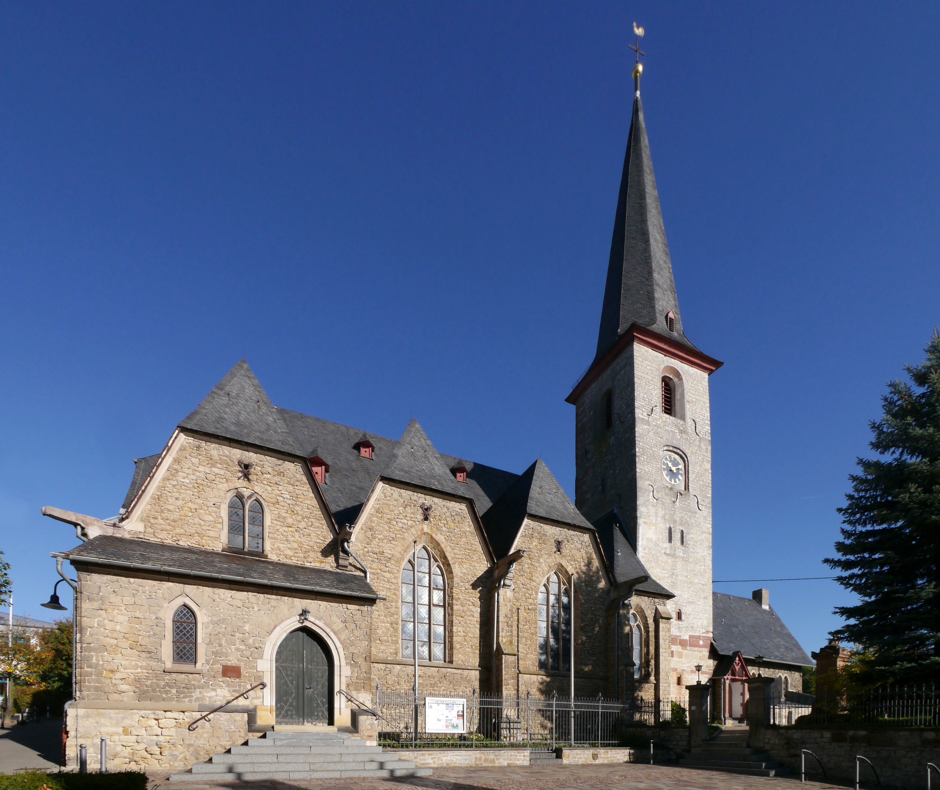 Katholische Kirche St. Martin; Turm im Unterbau romanisch, darüber 15. Jahrhundert; neugotisches Langhaus, Bruchstein, 1879–81; Seitenschiff und Chor 1899, Architekt Ludwig Becker, .